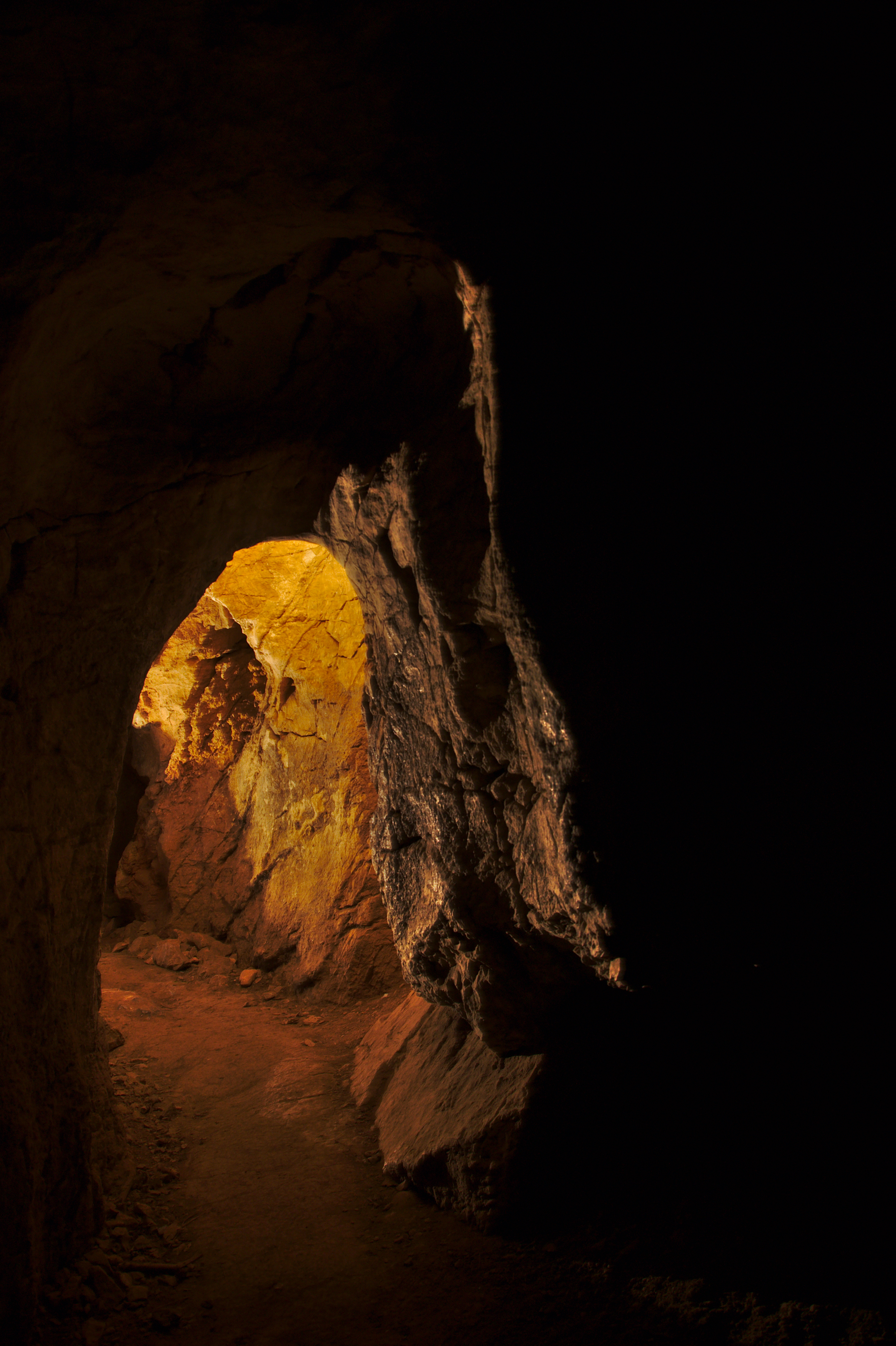 Jeskyně v masivu Kolíbky, národní přírodní rezervace Rudické propadání, okres Blansko